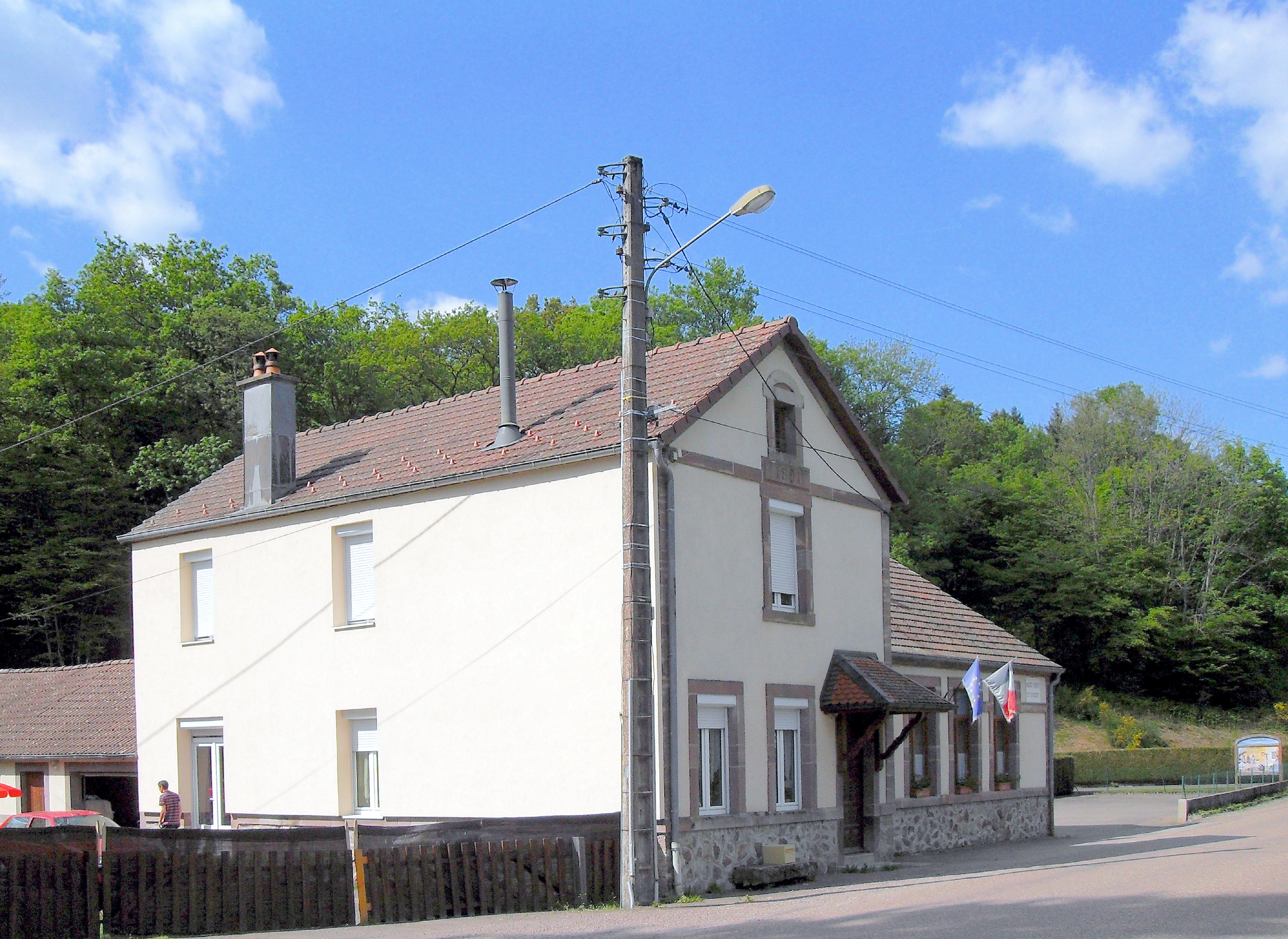 La mairie d'Amont-et-Effreney